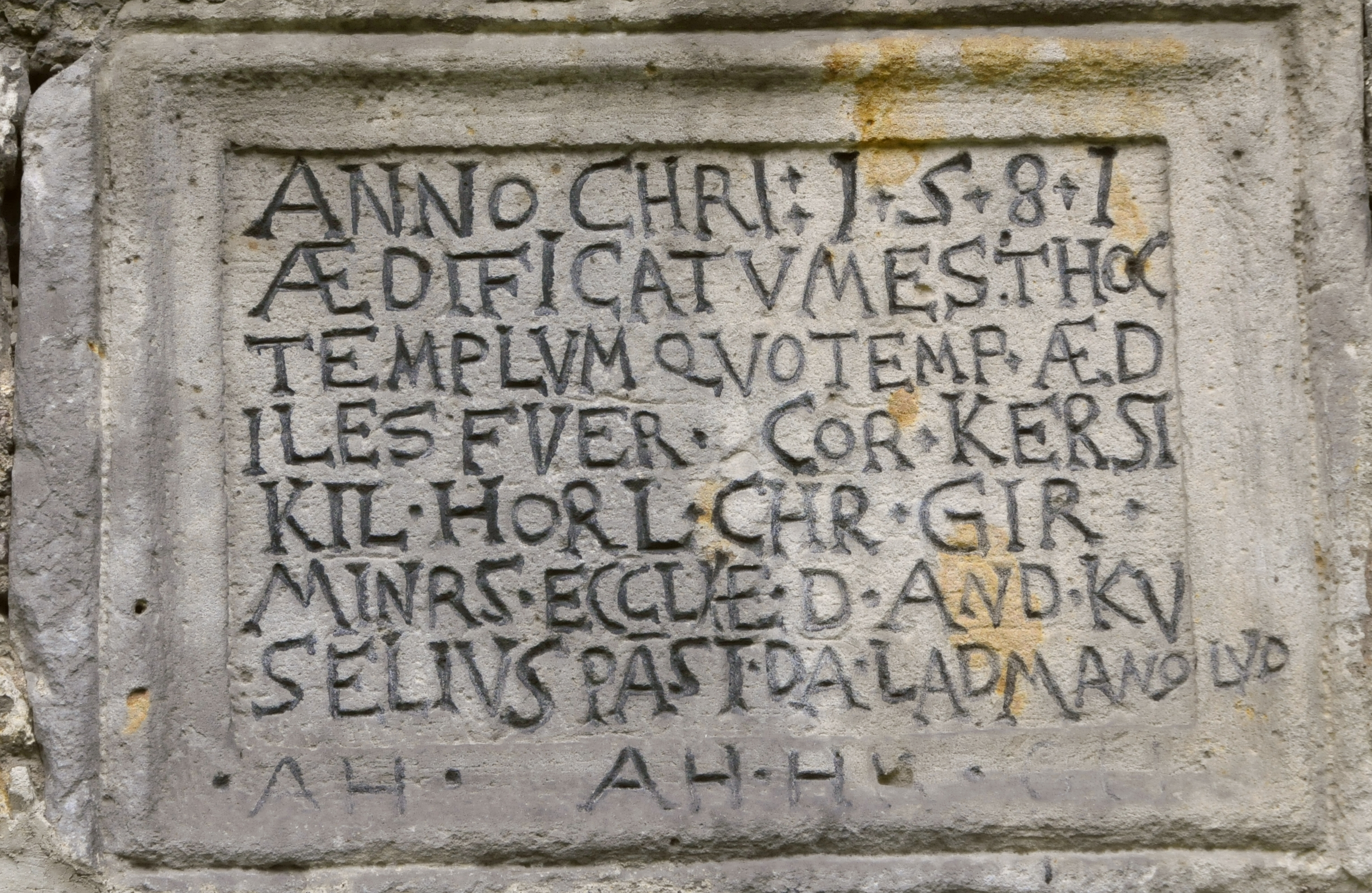 Zeittafel an der Kirche in Gossel